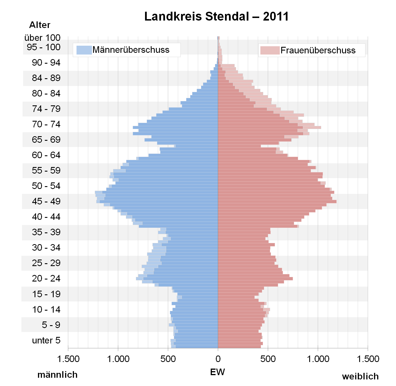 Bevölkerungspyramide des Landkreises Stendal nach Zensus 2011.